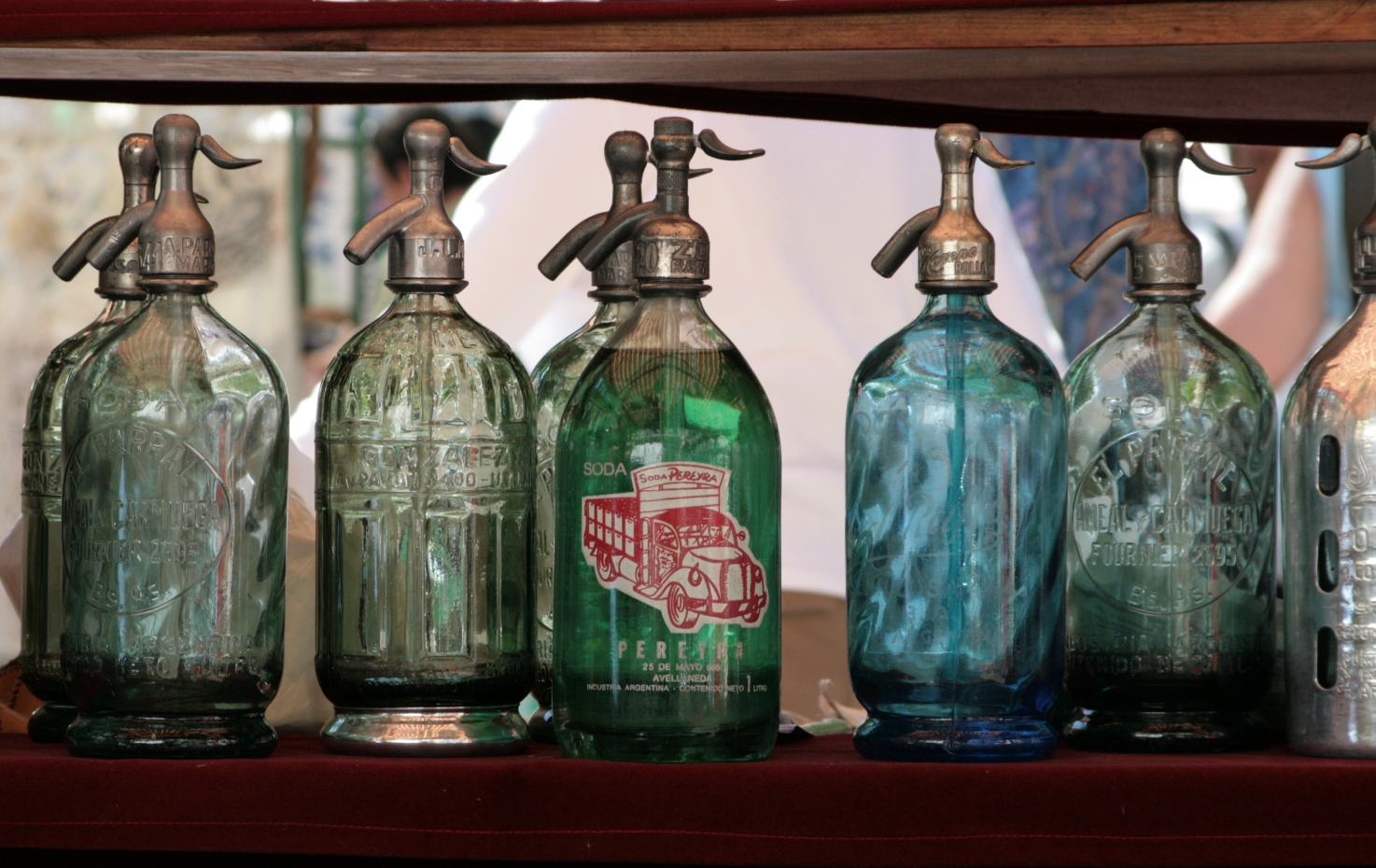 Un conjunto de sifones se vende como antigüedad en el mercado de San Telmo. El sifón era utilizado en las casas familiares para almacenar el agua con gas que se bebía en las comidas. En la actualidad, los domingos se instala en el barrio de San Telmo una feria de antigüedades, con puestos de venta de encajes, obras de arte y objetos antiguos de uso cotidiano. La plaza se encuentra, además, rodeada por edificios de fines de los siglos xix y xx que albergan cafés, restaurantes y bares donde se disfruta un ambiente animado, en especial durante las noches de verano.